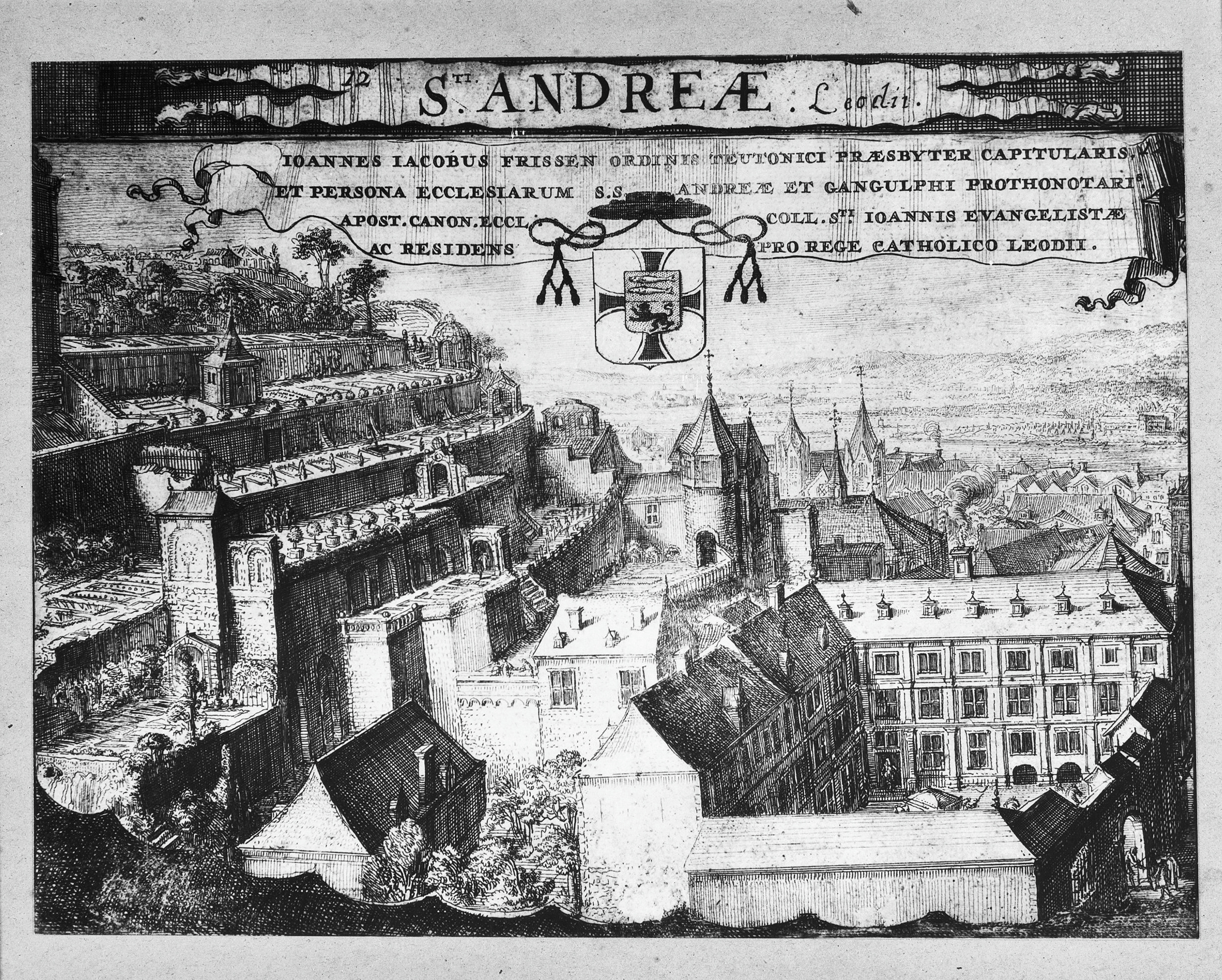 Ets/ Kasteel: Ets met kasteel Commanderij St. André (opmerking: Ets door Rom. de Hooghe in prentenkabinet van de Abdij Godsdal (Val Dieux) te Aubel (België))